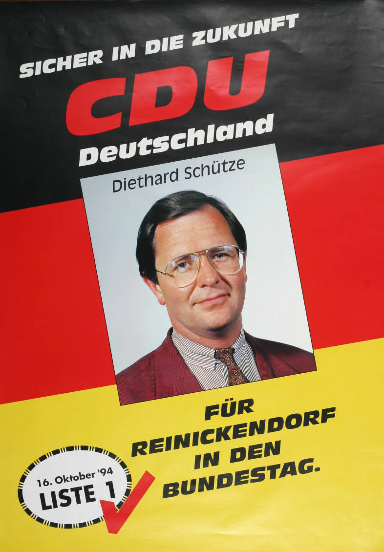 Sicher in die Zukunft CDU Deutschland Diethard Schütze Für Reinickendorf in den Bundestag. 16. Oktober '94 Liste 1 Abbildung: Porträtfoto - Nationalfarben Plakatart: Kandidaten-/Personenplakat mit Porträt Objekt-Signatur: 10-001: 4023 Bestand: Plakate zu Bundestagswahlen (10-001) GliederungBestand10-18: Plakate zu Bundestagswahlen (10-001) » Die 13. Bundestagswahl am 16. Oktober 1994 » CDU » Mit Porträtfoto Lizenz: KAS/ACDP 10-001: 4023 CC-BY-SA 3.0 DE